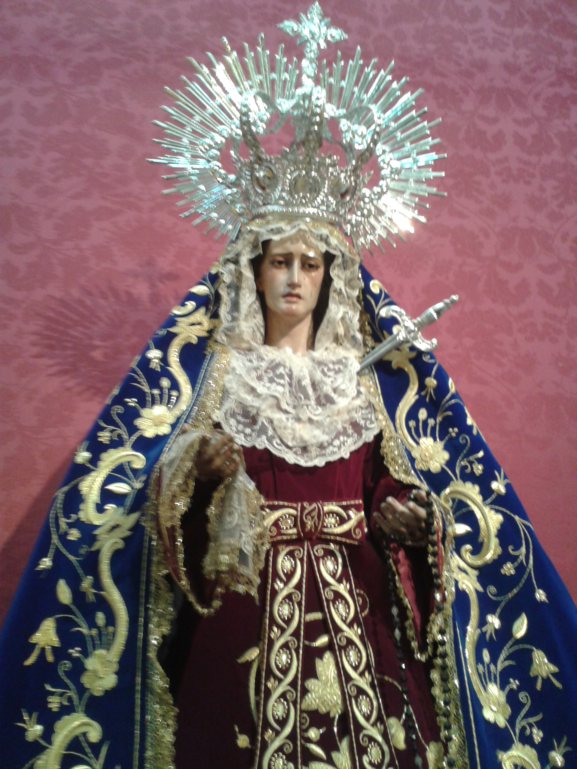 Dolorosa de la Archicofradía de la Sangre (Málaga, España). Obra de Antonio Gutiérrez de León (1831-1896).